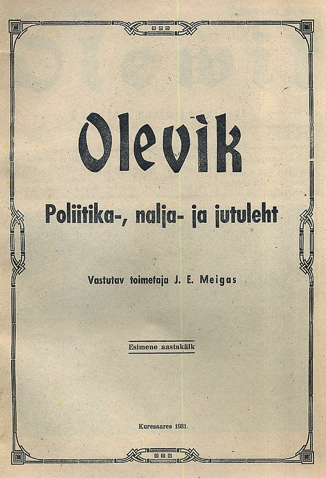 Ajakirja Olevik 1931 esikaan